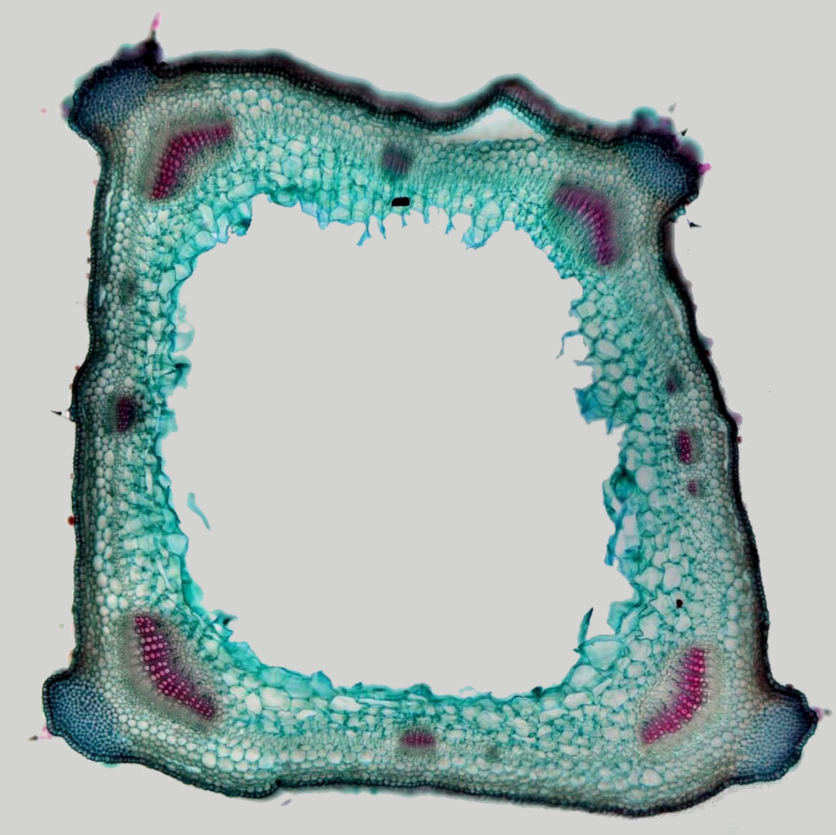 Lamium sp. (deadnettle), leaf, Etzold green.